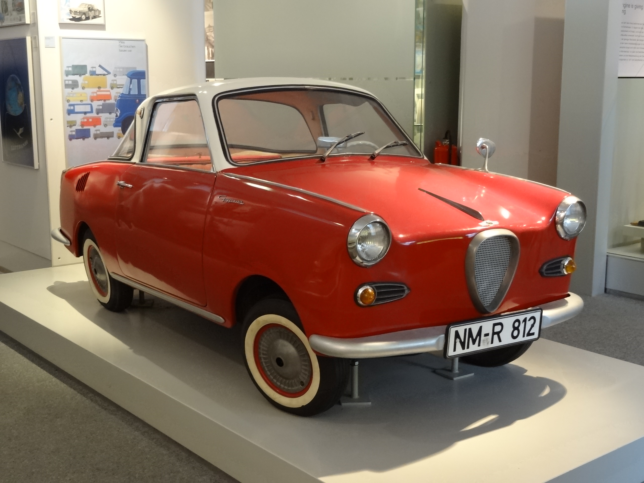 Gegenüberstellung Schienenbus - Goggomobil